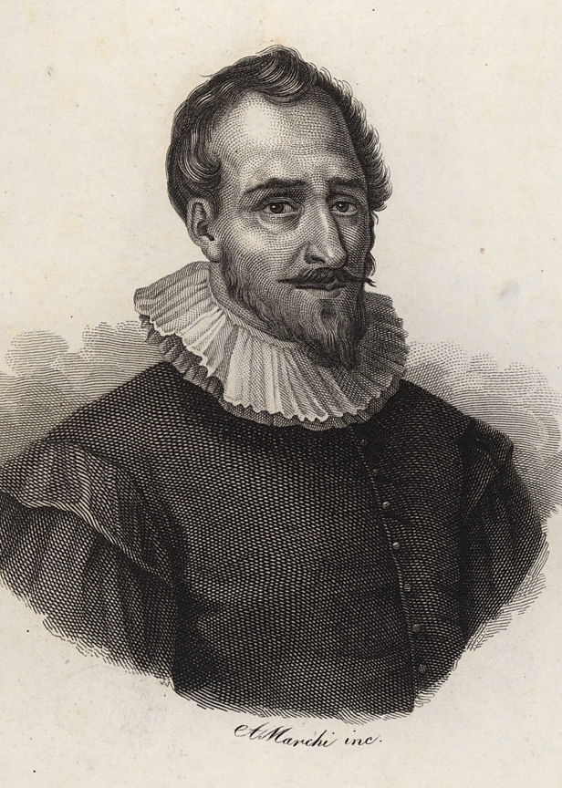 French engineer Adam de Craponne (1526-1576)